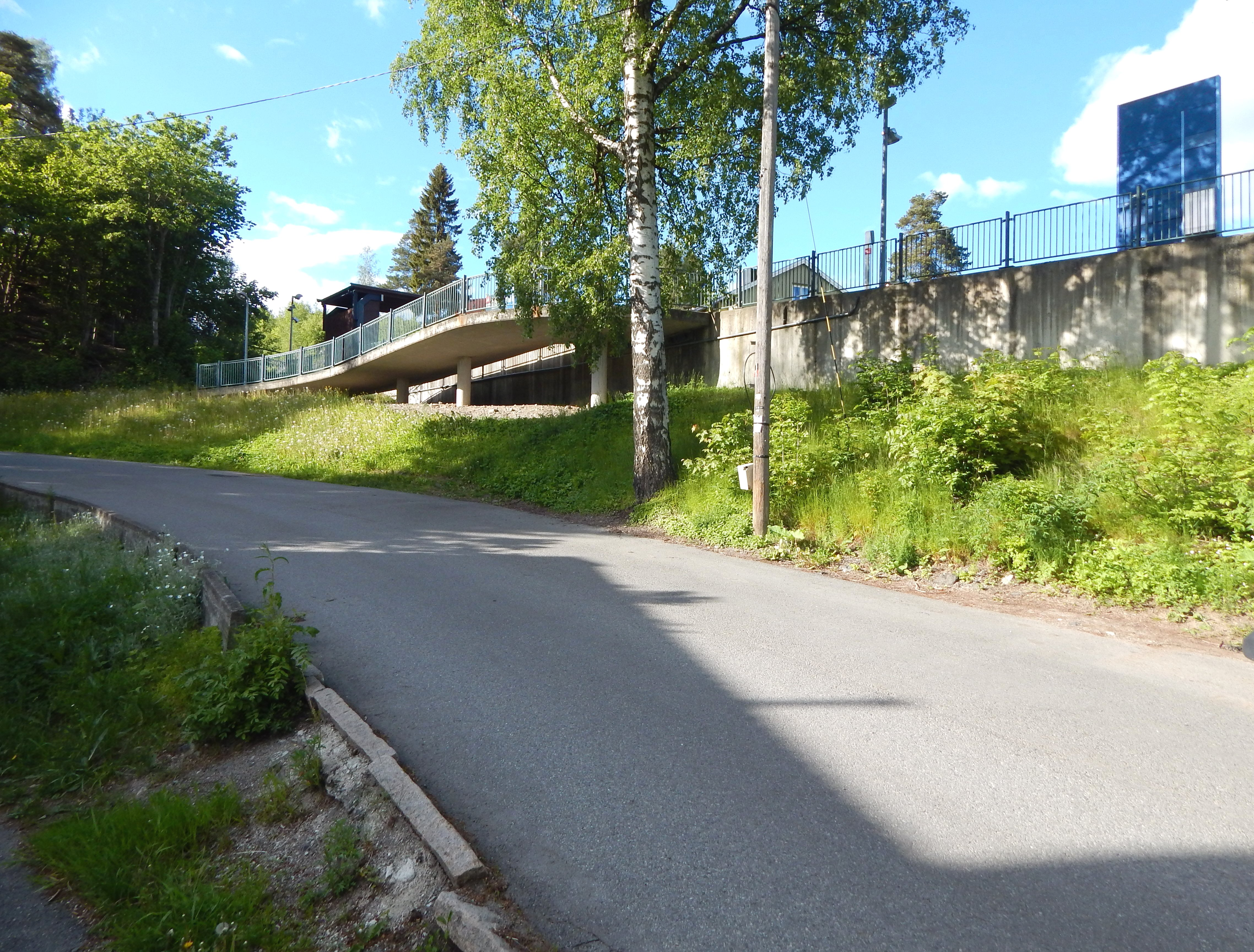 Gunnar Johnsons vei